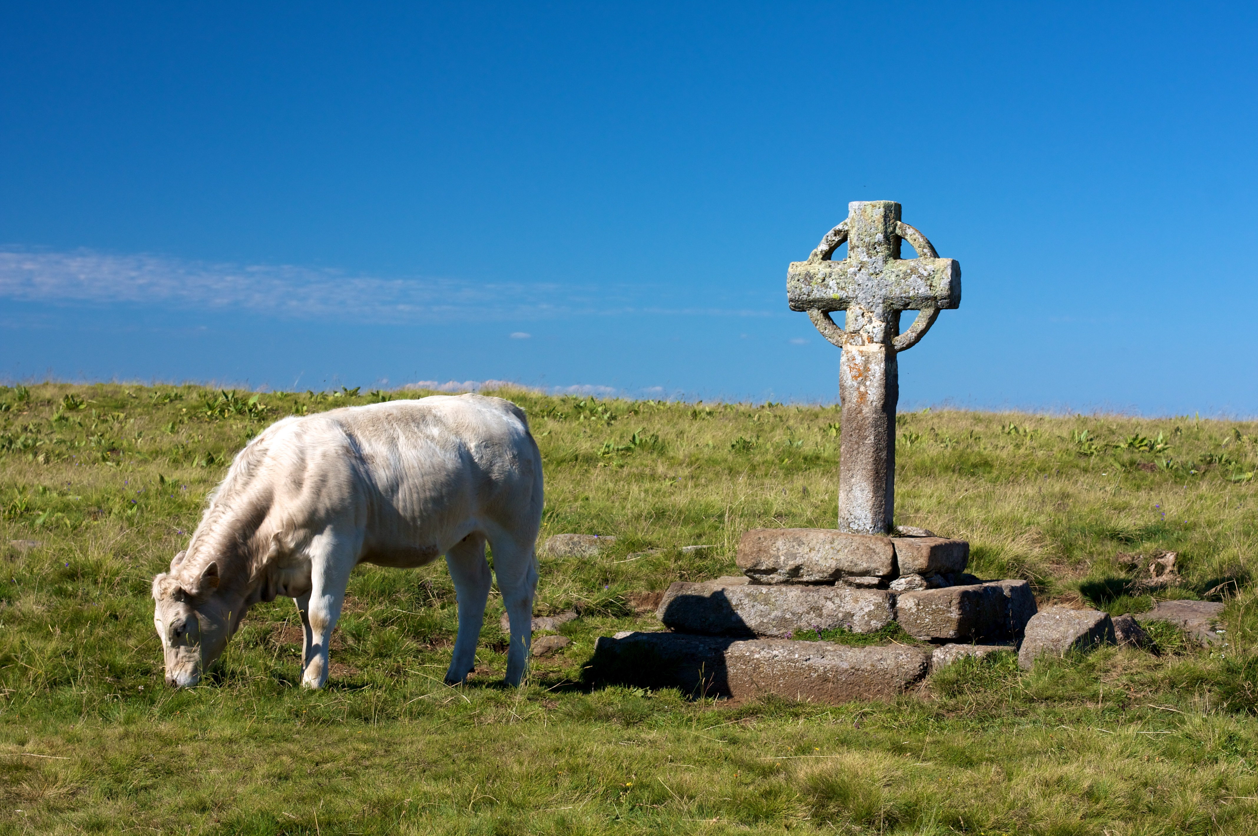 La croix de la Rode sur l'Aubrac